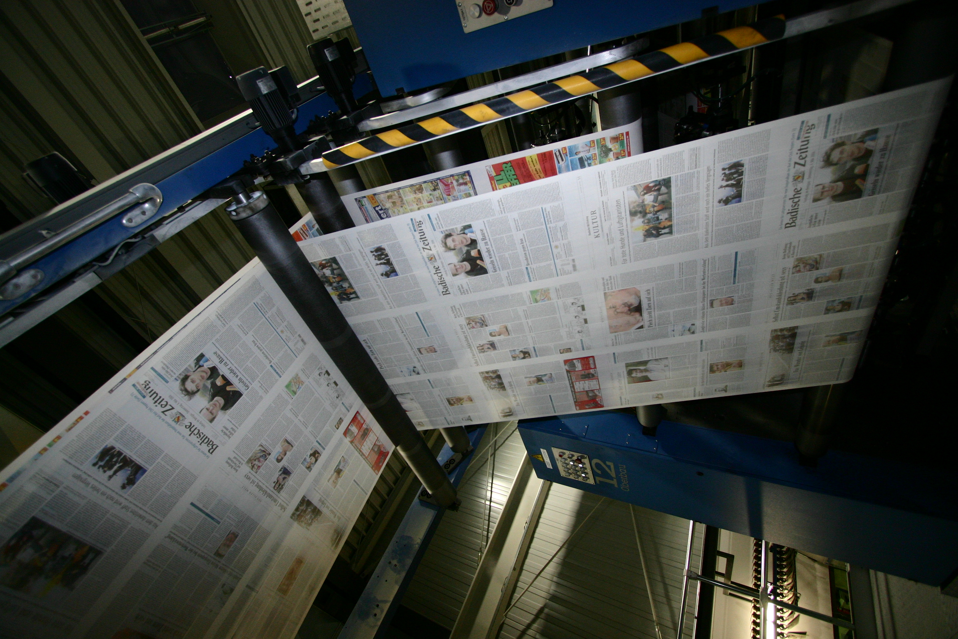 Rotation der Badischen Zeitung